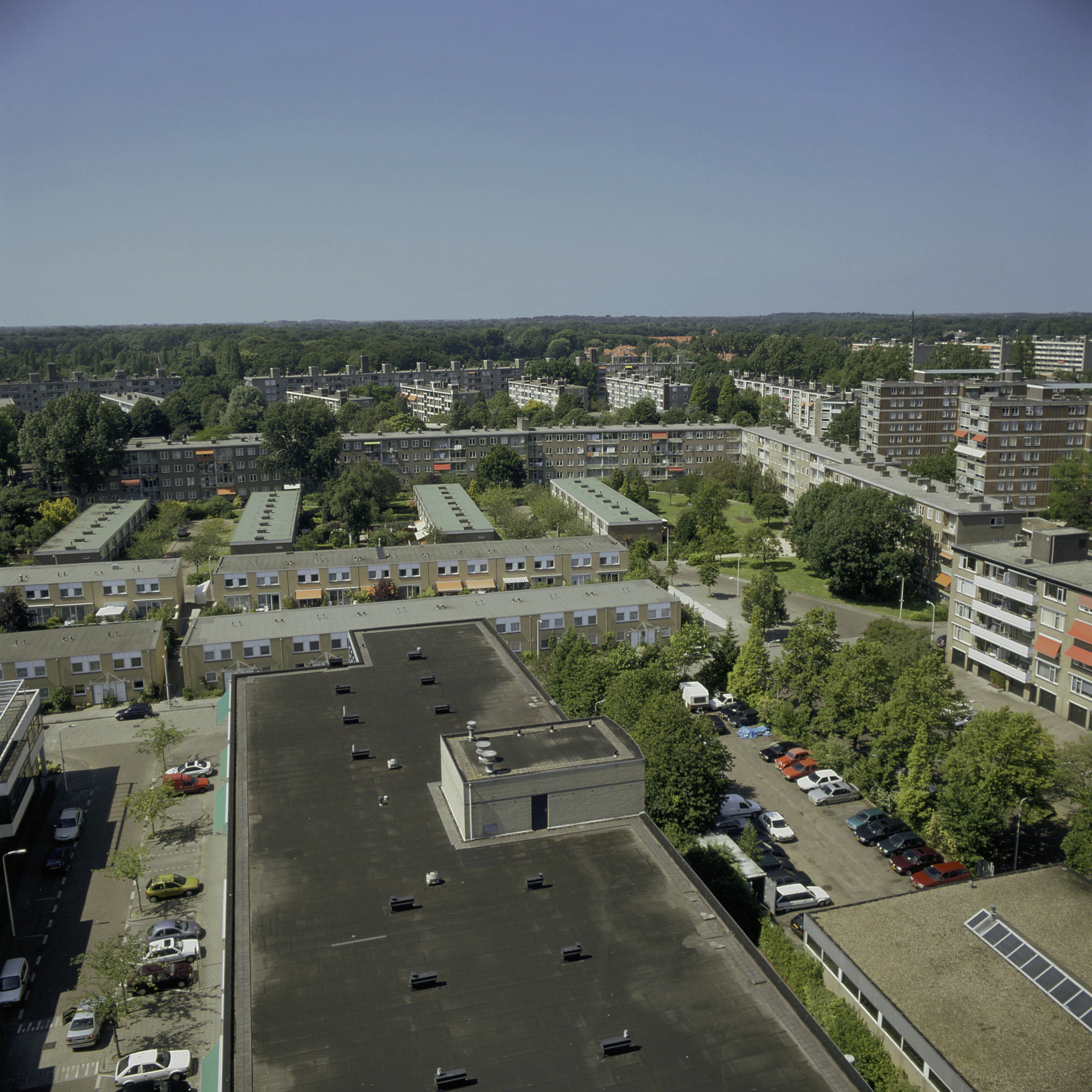 Mariahoeve/ Wederopbouw: Zicht op de wijk Mariahoeve gezien vanaf flatgebouw (opmerking: Gefotografeerd voor Toonbeelden van de Wederopbouw)